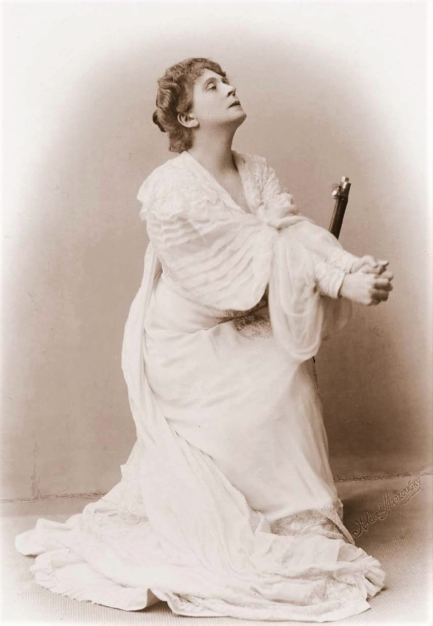 финская актриса Ида Эмилия Аальберг в роли Магды в пьесе Германа Зудермана «Дом». Санкт-Петербург. 1904/1905